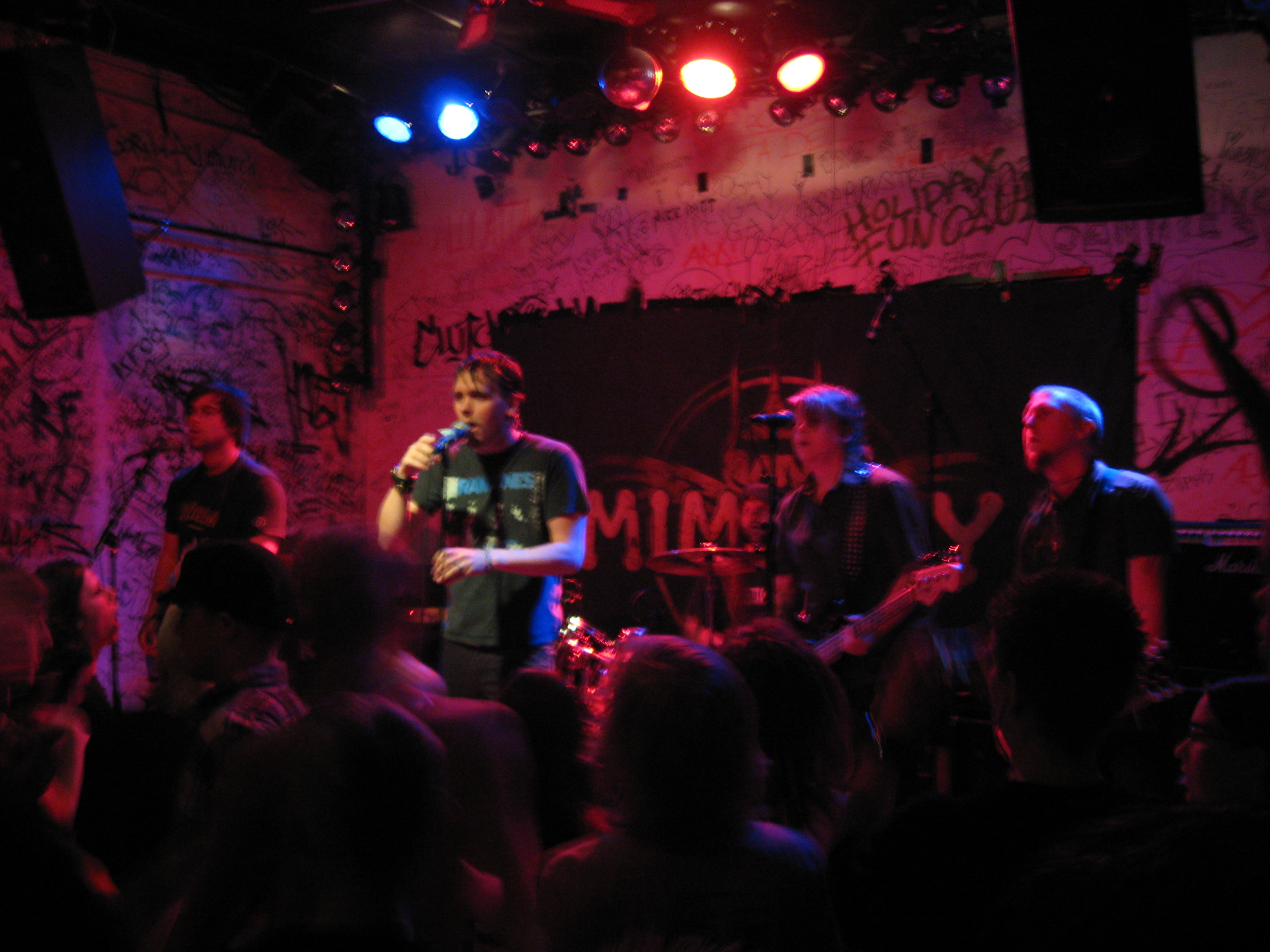 Mimikry spelar på Kafé 44, 22 maj 2008